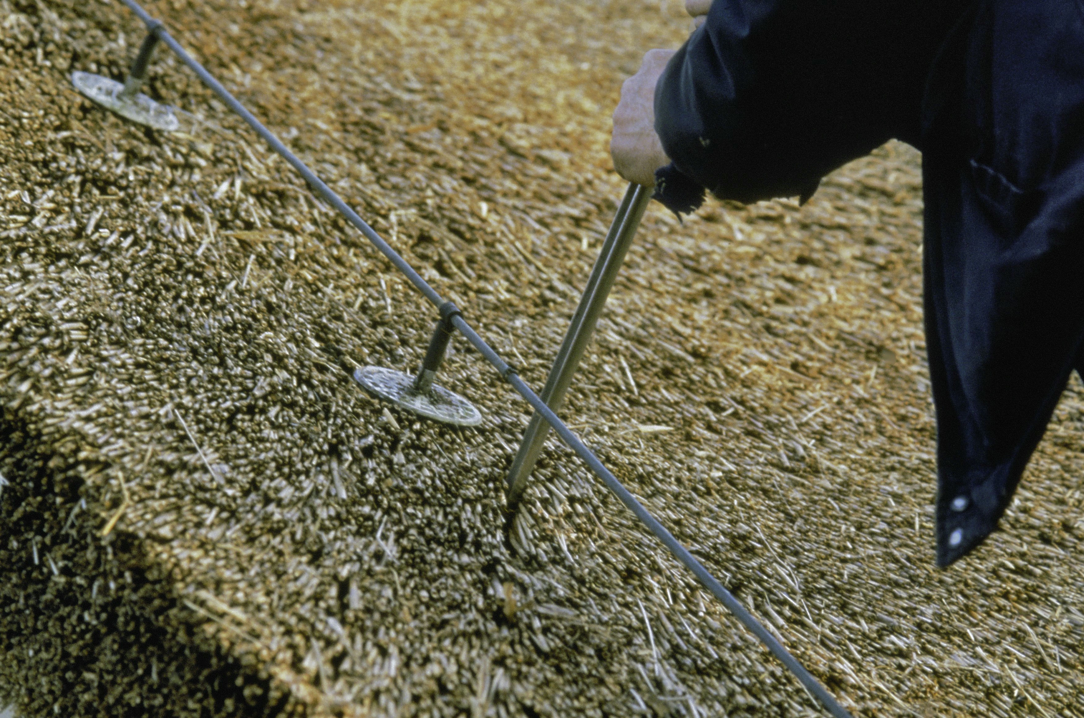 Riet/ Rieten dak: Rietdekker aan het werk: bliksembeveiliging wordt aangebracht (opmerking: Diaklankbeeld "Het Rieten Dak" (nr.: A 43))